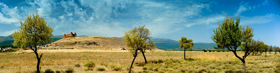 Fotografia panoramica del Castillo de la Calahorra